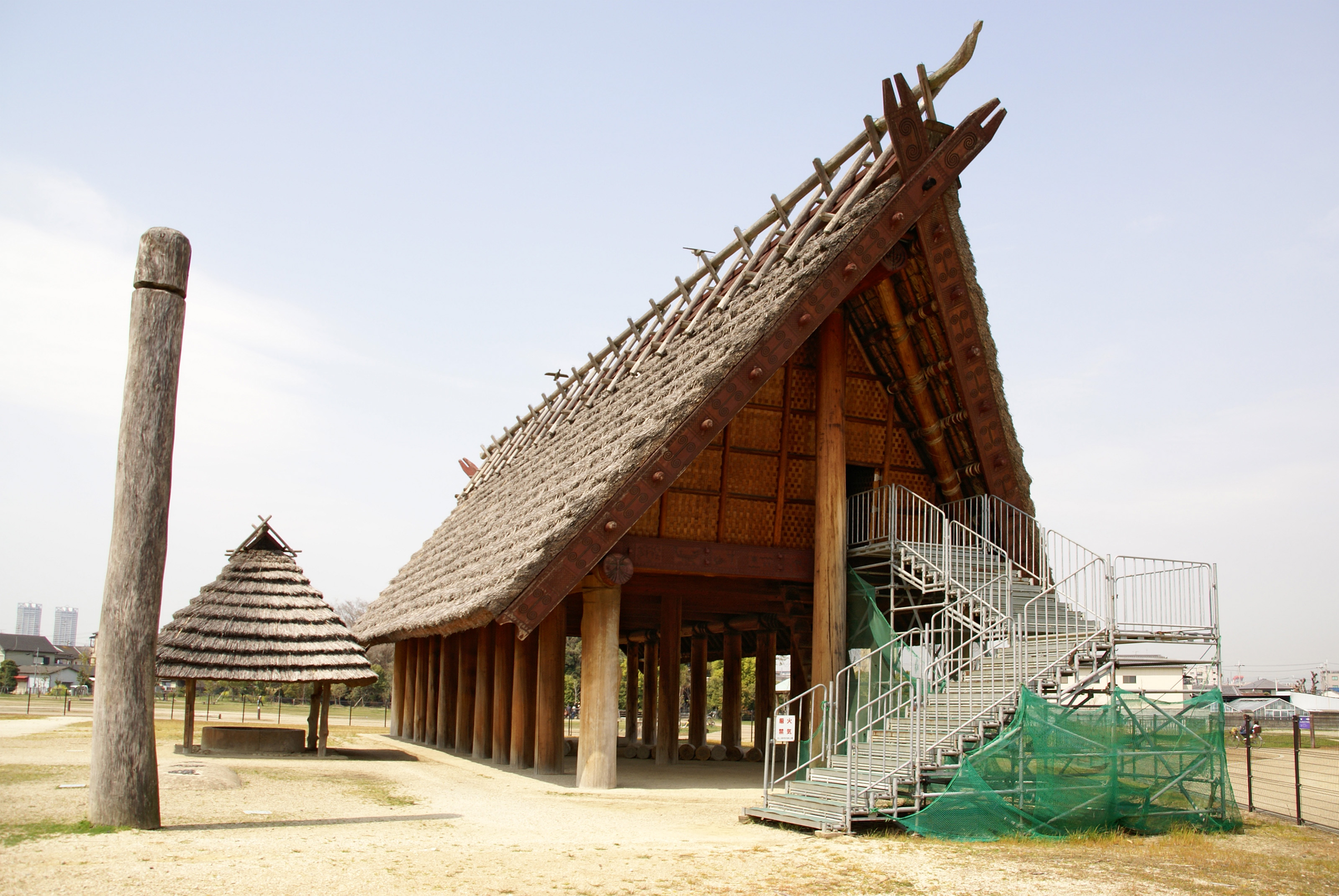 Ikegami-sone ruins in Izumi, Osaka prefecture, Japan